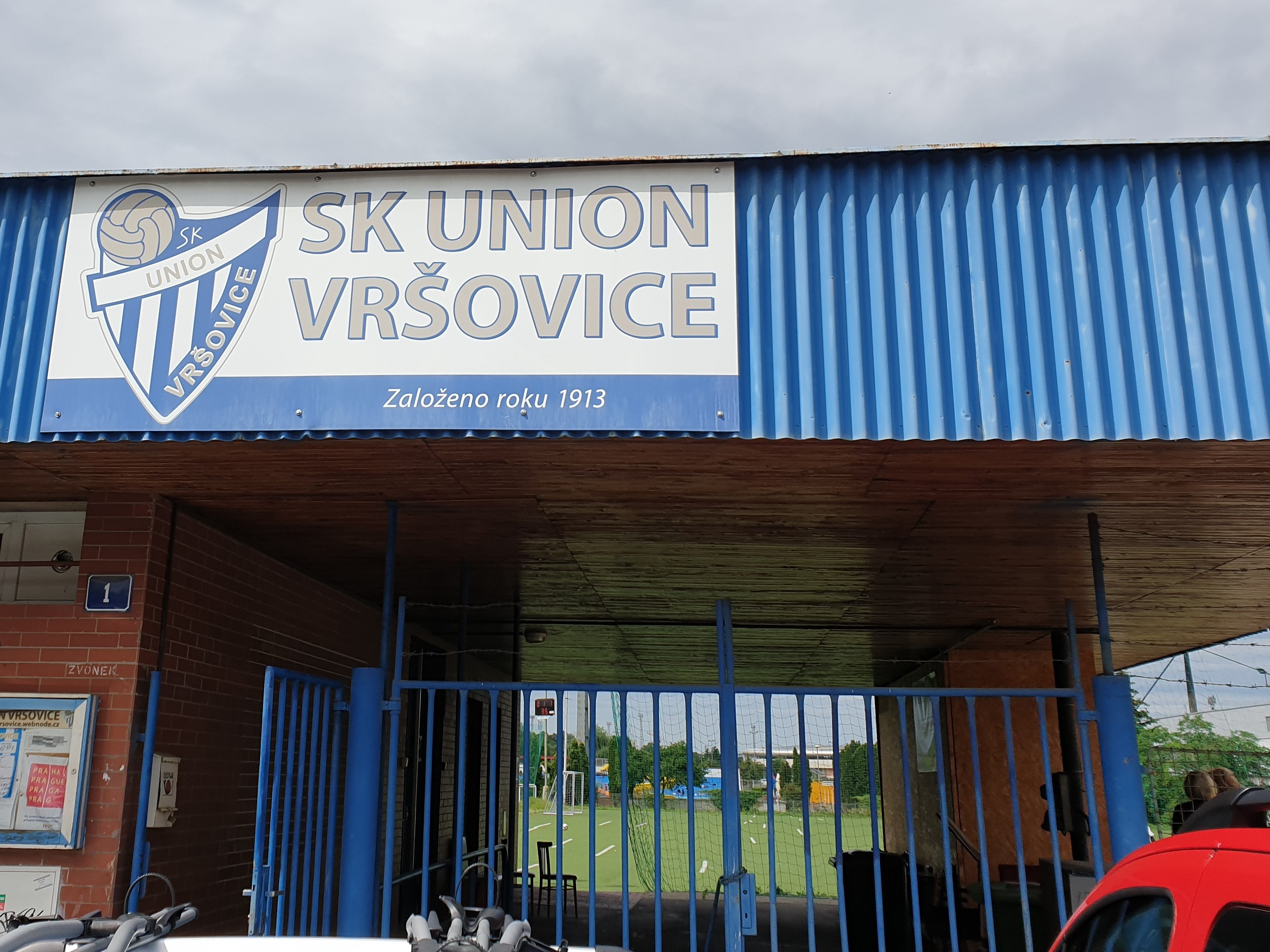 Hřiště